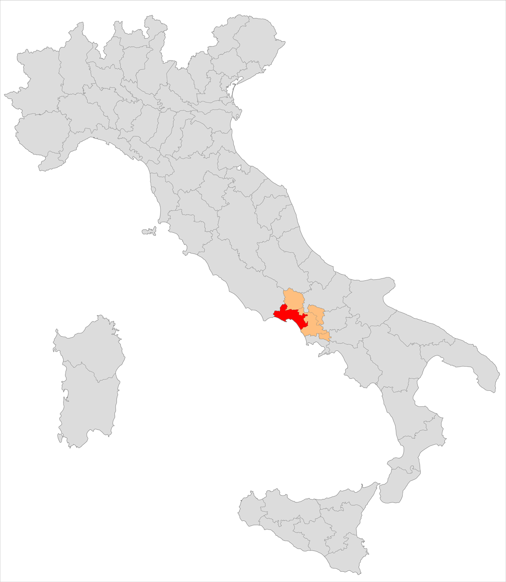 Il circondario di Gaeta nella provincia di Terra di Lavoro.